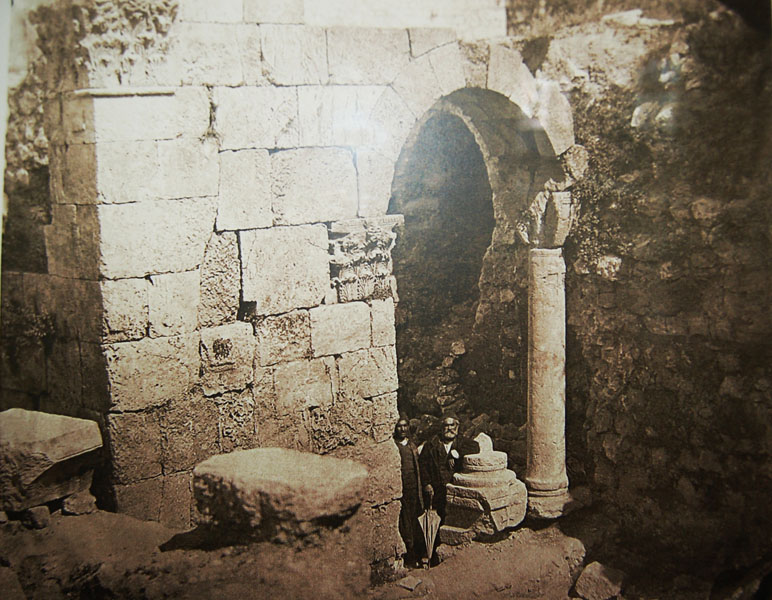 Русские раскопки в старом городе Иерусалима. 1883 г.